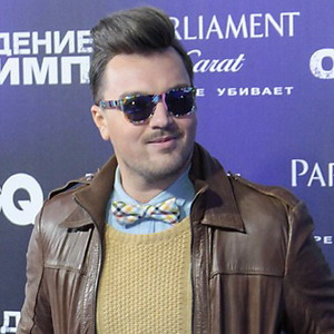 Александр Панайотов